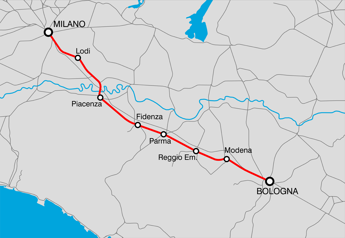 Mappa della ferrovia Milano-Bologna